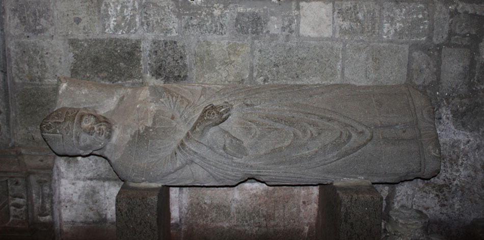 Resti attuali tomba Card. Vicedomini